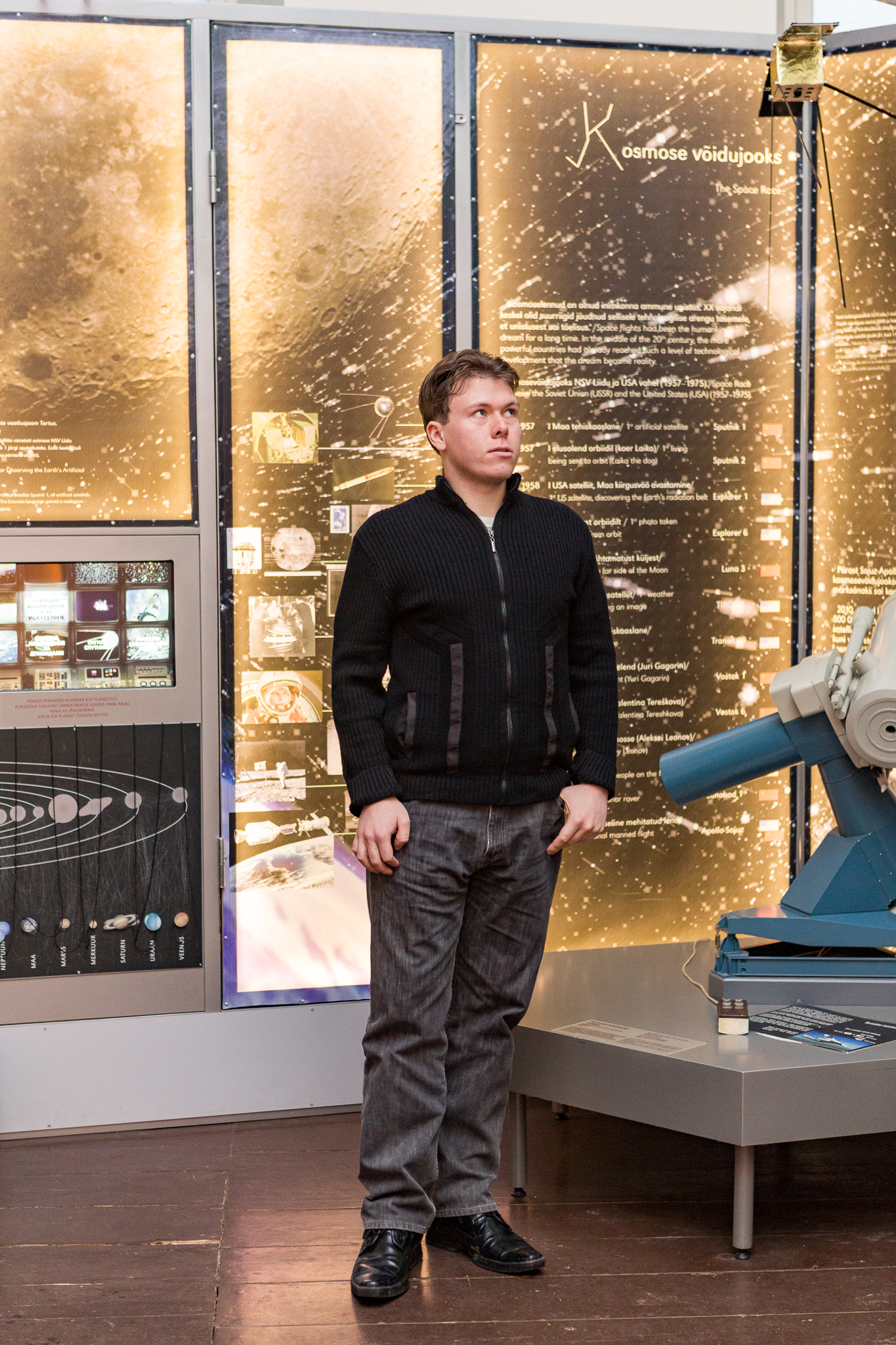 Teadusfoto 2015 lõpetamine Tartu Tähetornis.